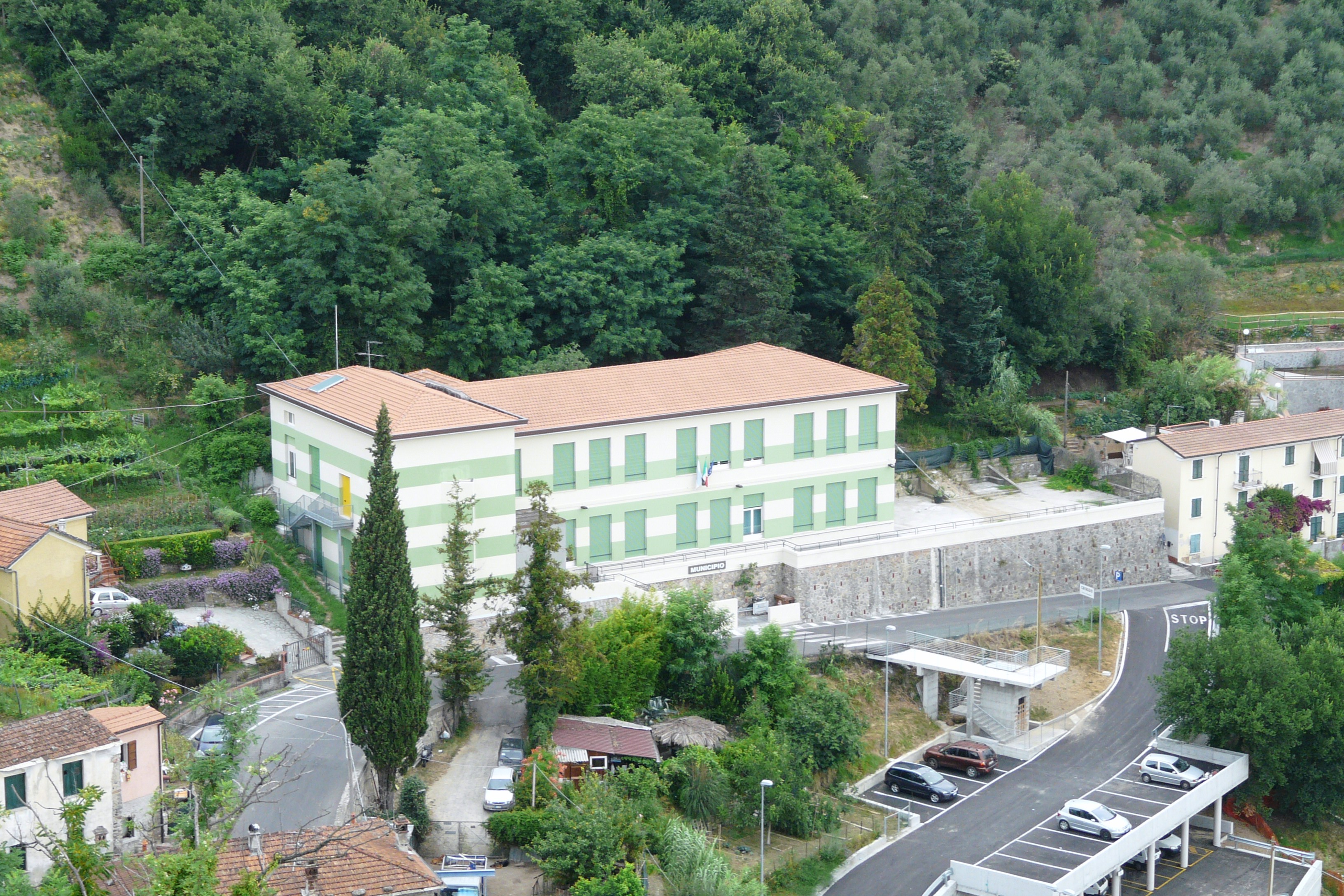 Municipio di Ameglia, Liguria, Italia